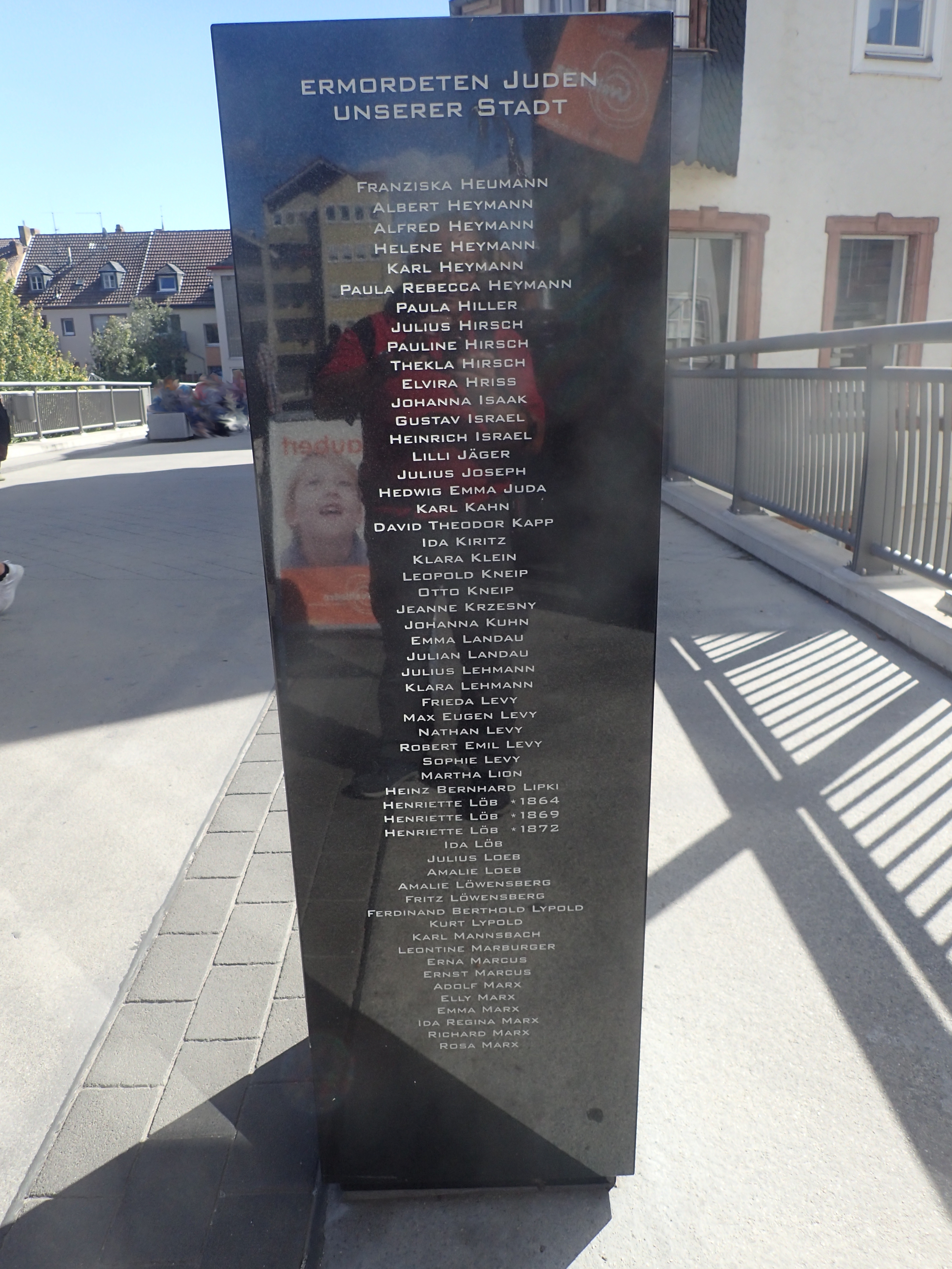 Gedenkstele für die von den Nationalsozialisten ermordeten jüdischen Mitbürger der Stadt Bad Kreuznach Seite 2